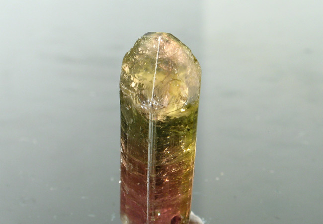 minerał:turmalin arbuzowy, pochodzenie Madagaskar; autor zdjęcia Stowarzyszenie Spirifer 10.07.2006r.